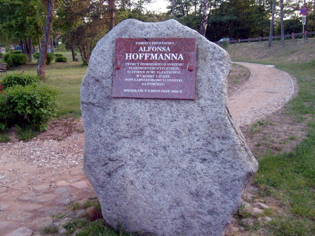 Tablica pamiątkowa poświęcona Alfonsowi Hoffmannowi we wsi Tleń, woj. kujawsko-pomorskie, pow. świecki.